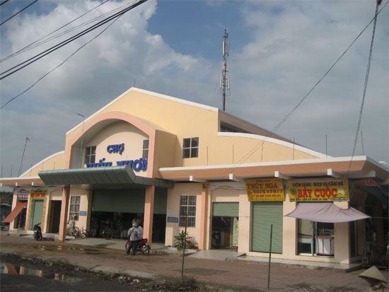 Chợ xã Hiếu Nhơn 2013